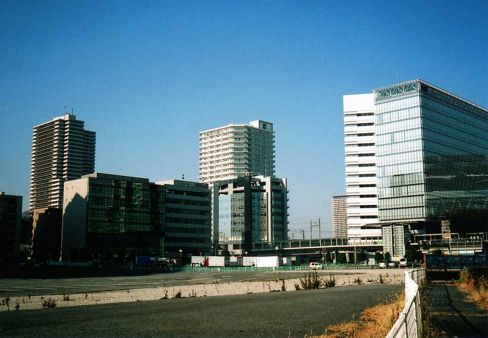 さいたま新都心8-1A街区、2008年12月下旬に利用者が撮影